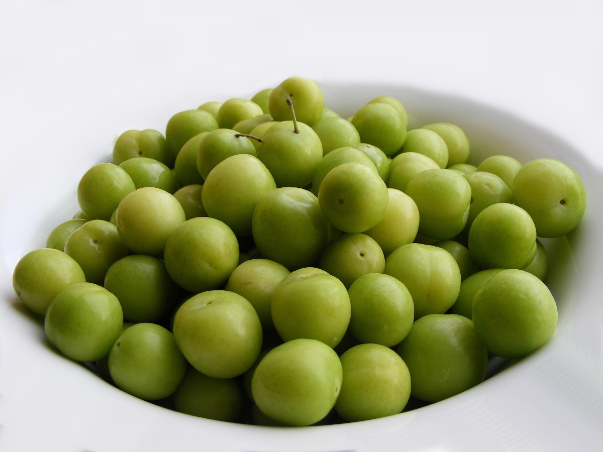 Prunus cerasifera 'Can Erik' fruits.